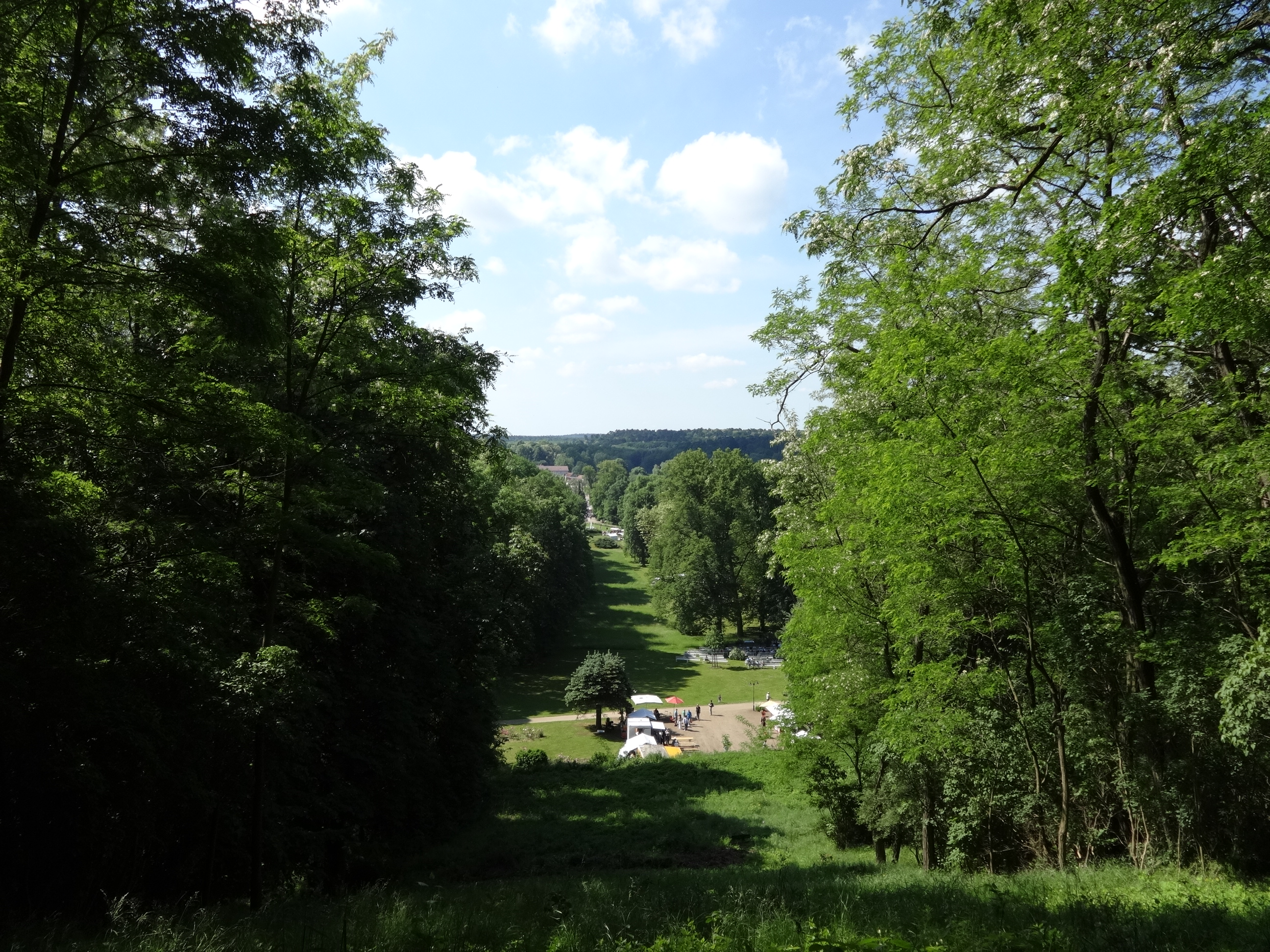 Schlossberg, eine 61 Meter hohe Erhebung eiszeitlichen Ursprungs im Schlosspark in Buckow (Märkische Schweiz)